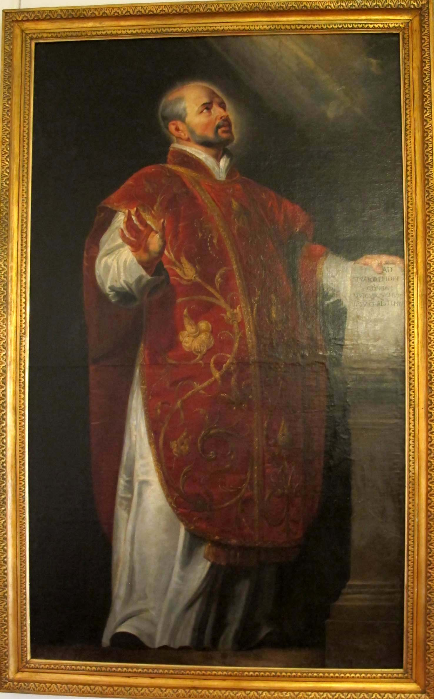 Pieter paul rubens (atelier), sant'ignazio di loyola